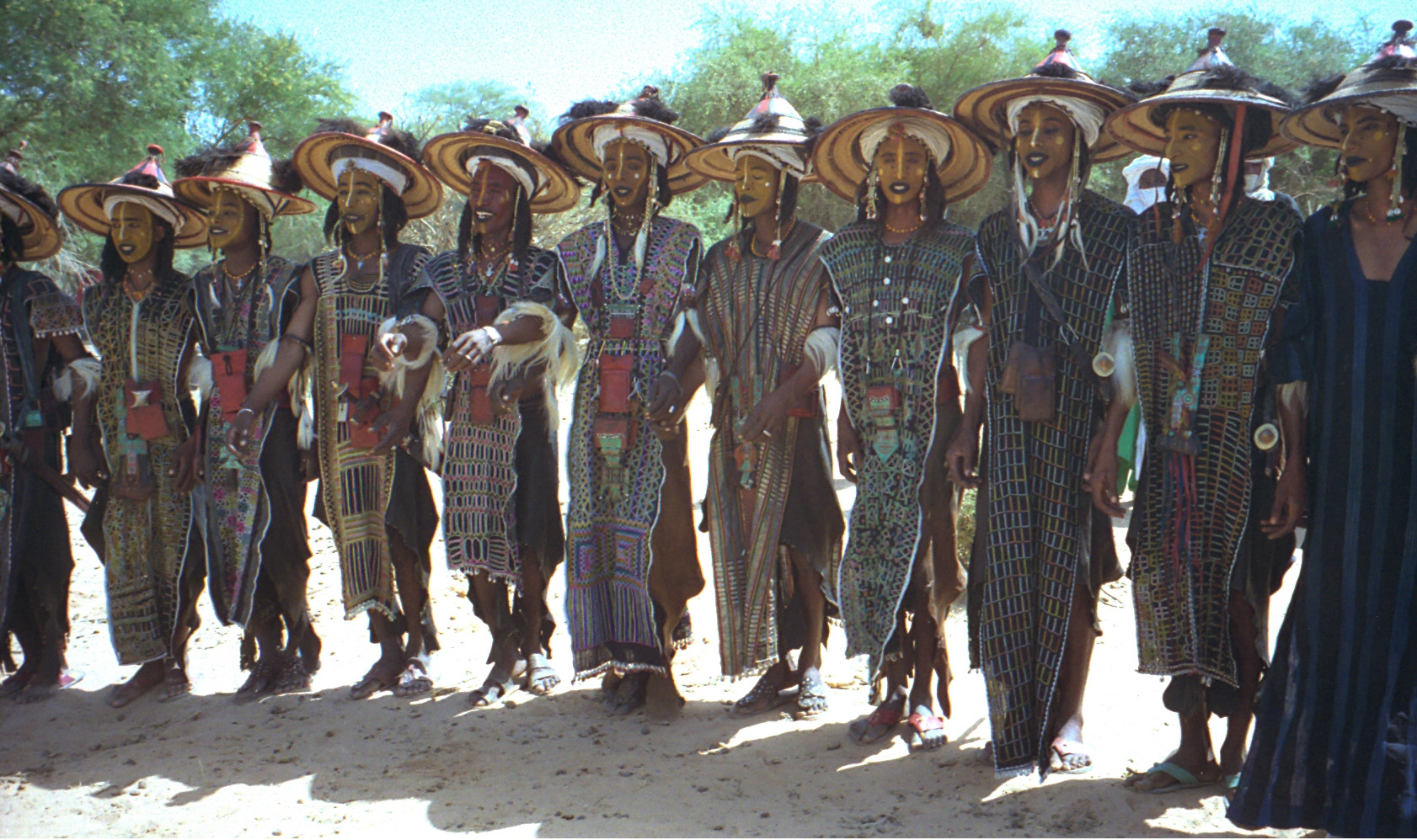 Wodaabe men performing a Yaake dance. Niger, 1997.1997 #276-17A Yaake demonstration